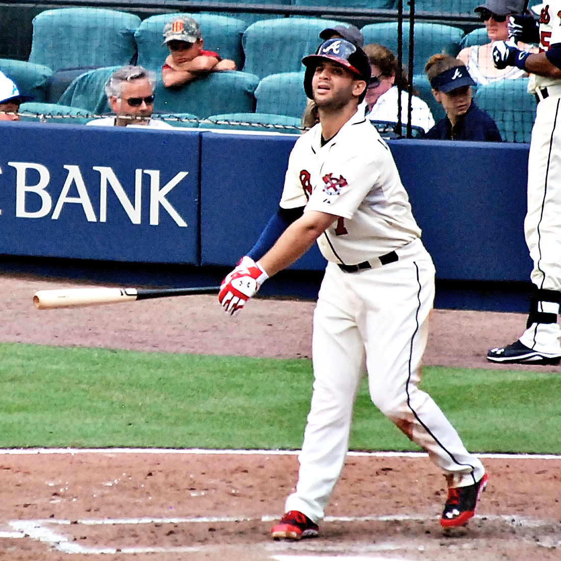 Tommy La Stella